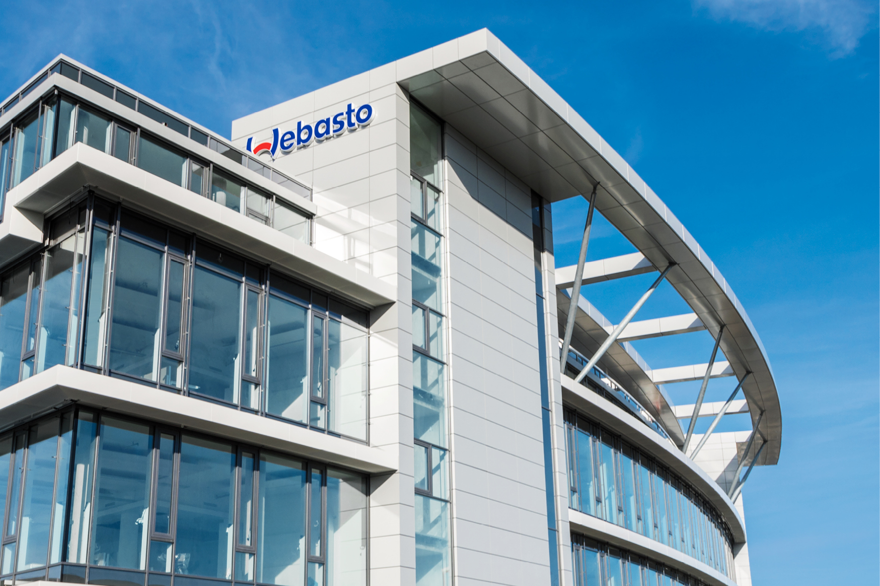 Die Webasto Zentrale in Stockdorf mit neuem Verwaltungs- und Entwicklungszentrums